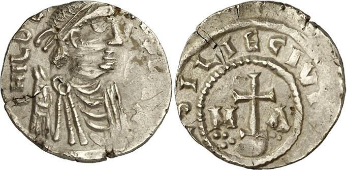 Solidus en or pâle de 20 siliques émis par Childéric II (662-675). Avers : CHILDE…CVS REX grand buste diadémé et drapé à droite. Revers : (MA)SILIE CIVIT[ATI] croix au pied potencé, accostée des lettres M et A, posée sur un globe, entre deux séries de points : quatre d’un côté pour X et deux de l’autre, (résidu des chiffres de valeur). Ce monnayage est presque en argent, c’est le tout dernier solidus marseillais. On considère que c’est à partir de 675 que l’or disparaît en Gaule. A Marseille, la disparition de l’or n’est pas aussi précise que dans le royaume Franc. On peut encore attribuer des tremisses à Clovis III (675-676) et à Dagobert II (676-679).